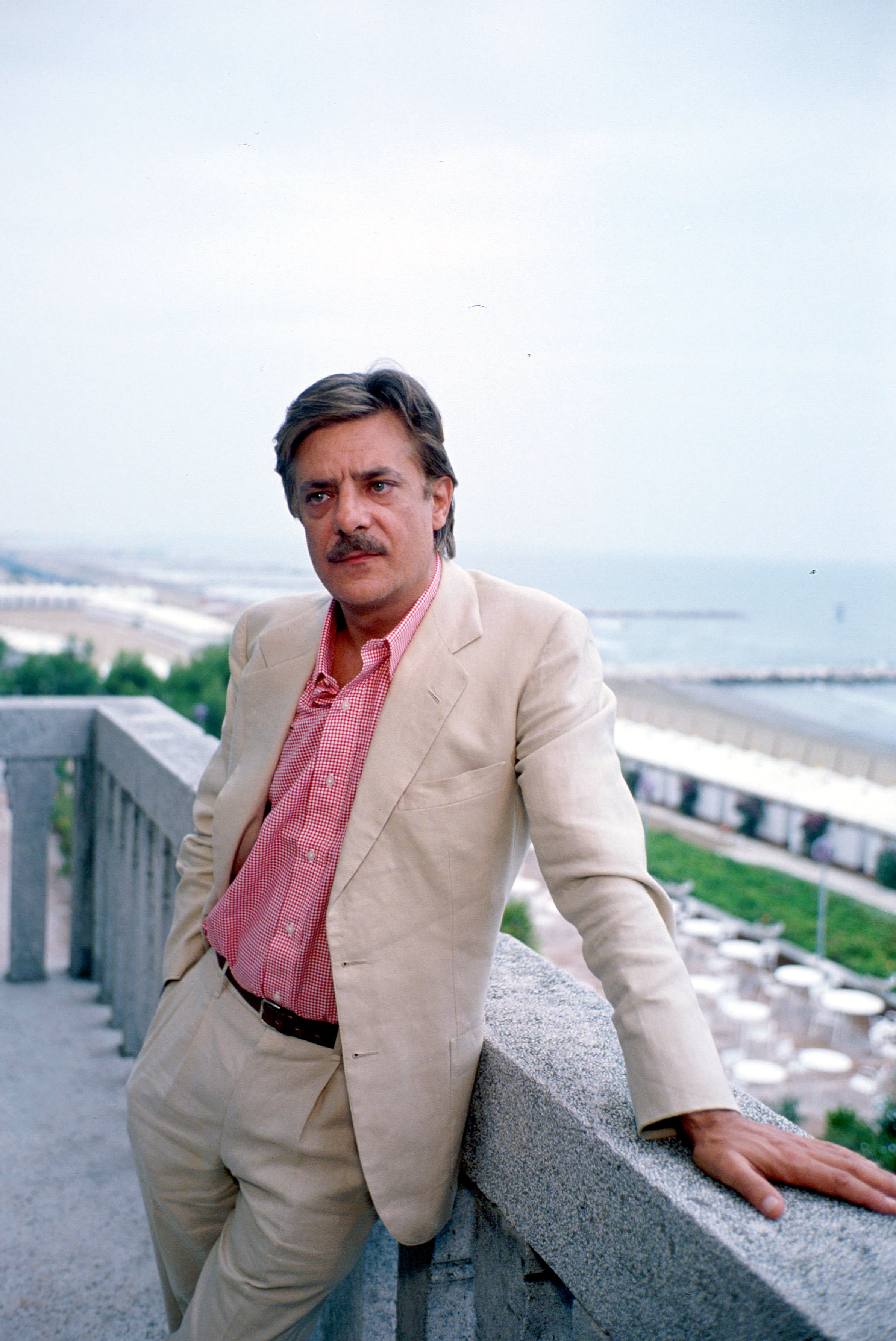 nel 1992 alla Mostra del cinema di Venezia